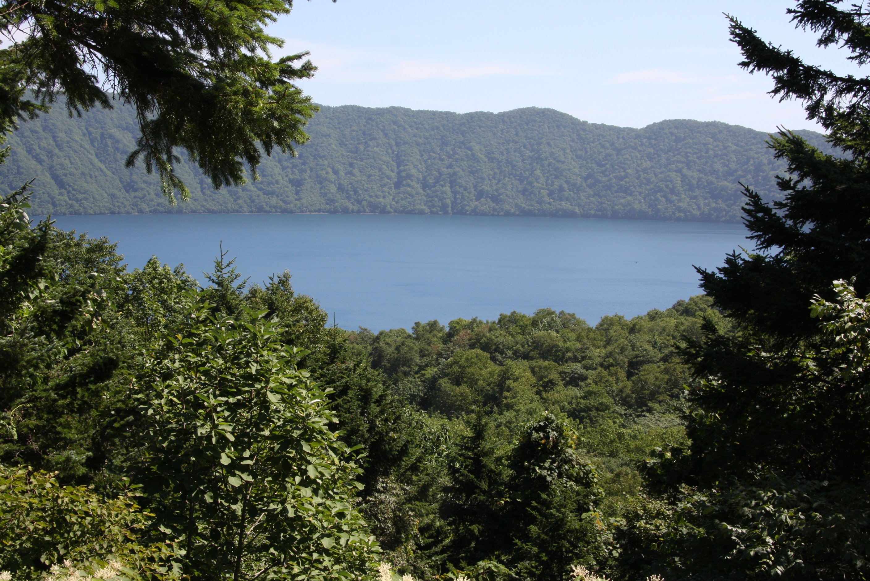 北海道道350号展望台より望見する倶多楽湖